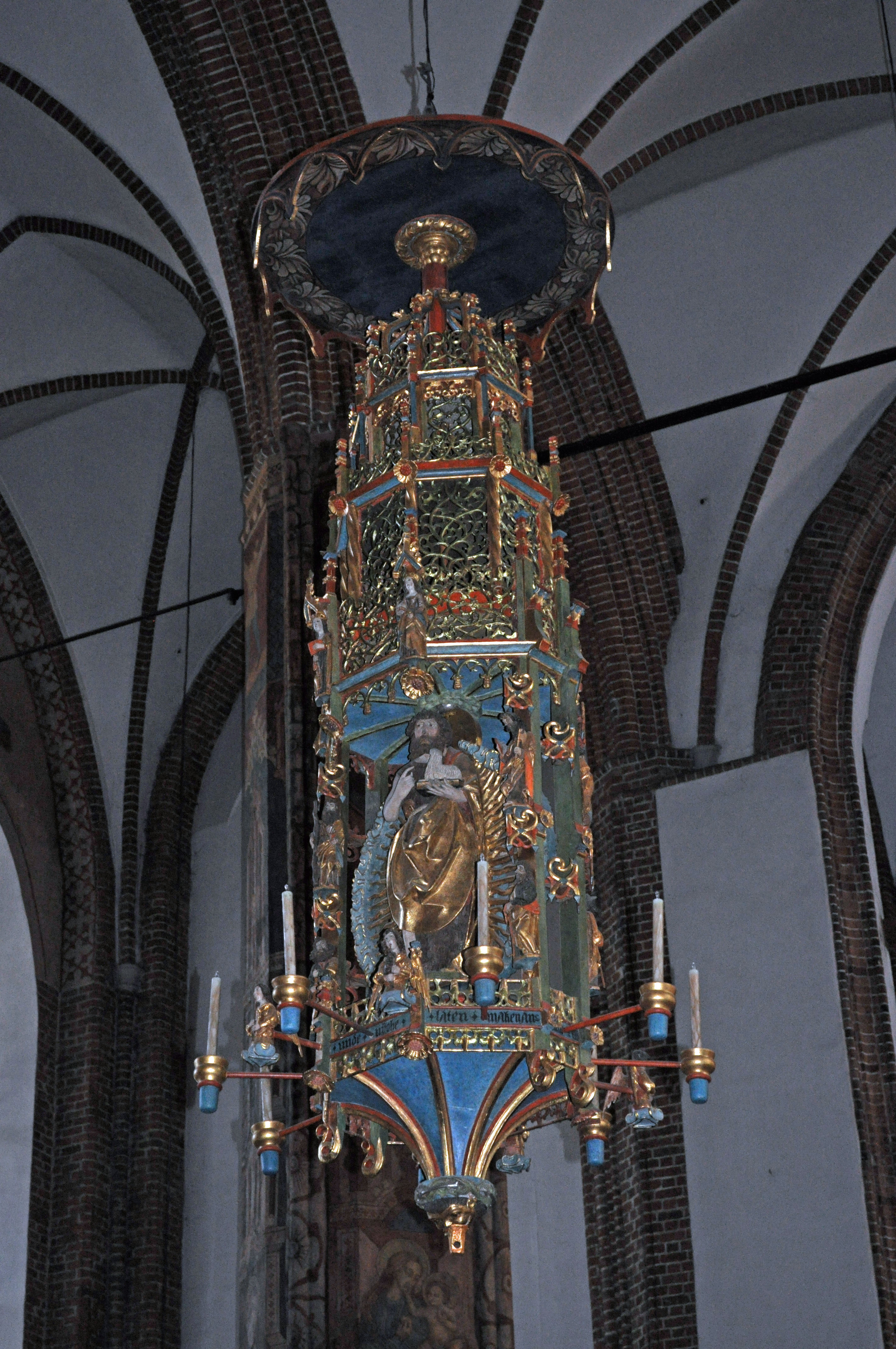 In Kołobrzeg (Polen). Aufgenommen am 27. Juli 2011.